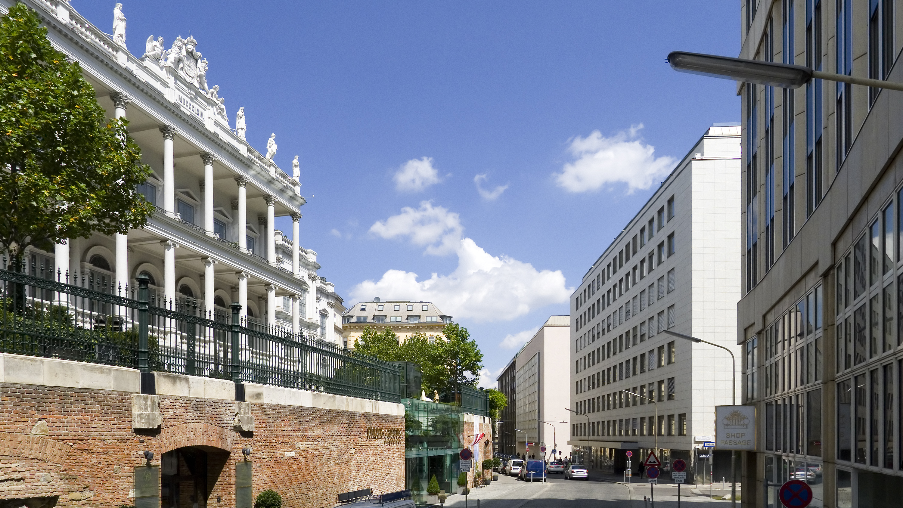 Coburgbastei in Wien 1 bei Nr. 7 Richtung Nordosten